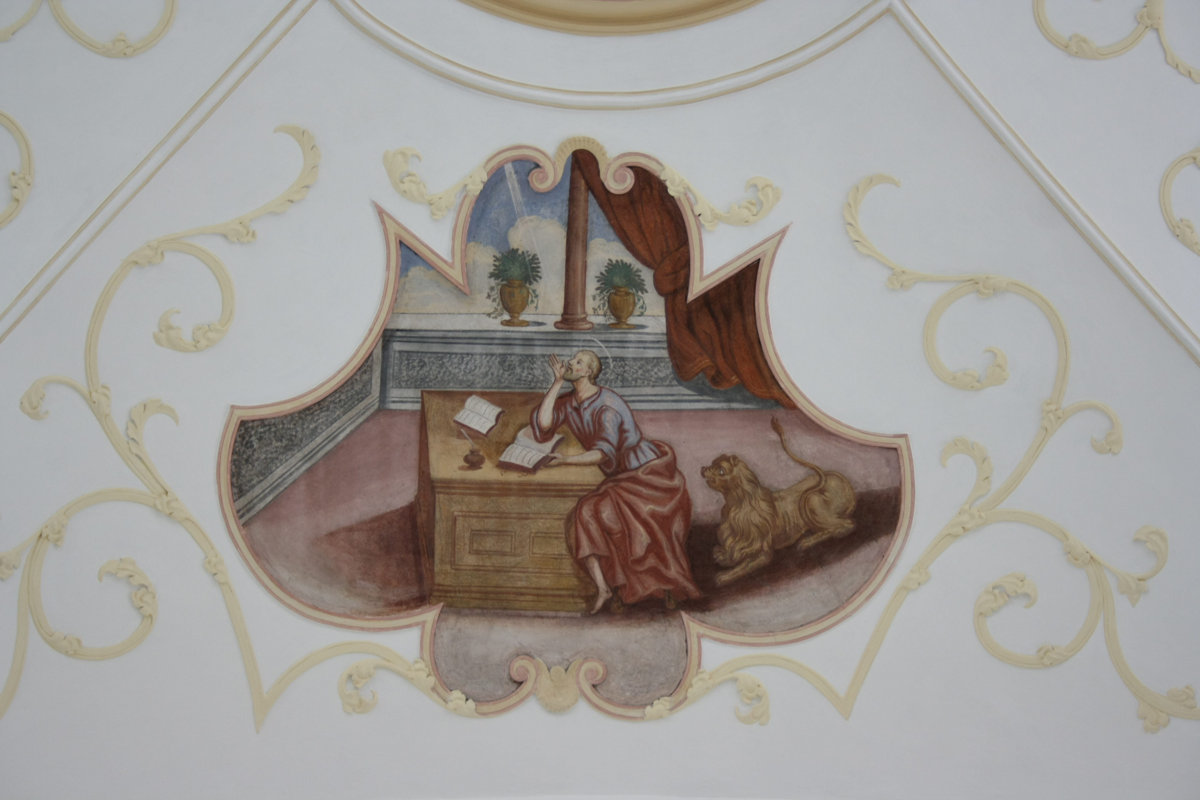 Katholische Pfarrkirche St. Ulrich und Johannes Baptist in Schwenningen im Landkreis Dillingen an der Donau, Deckenfresko mit Darstellung des Evangelisten Markus